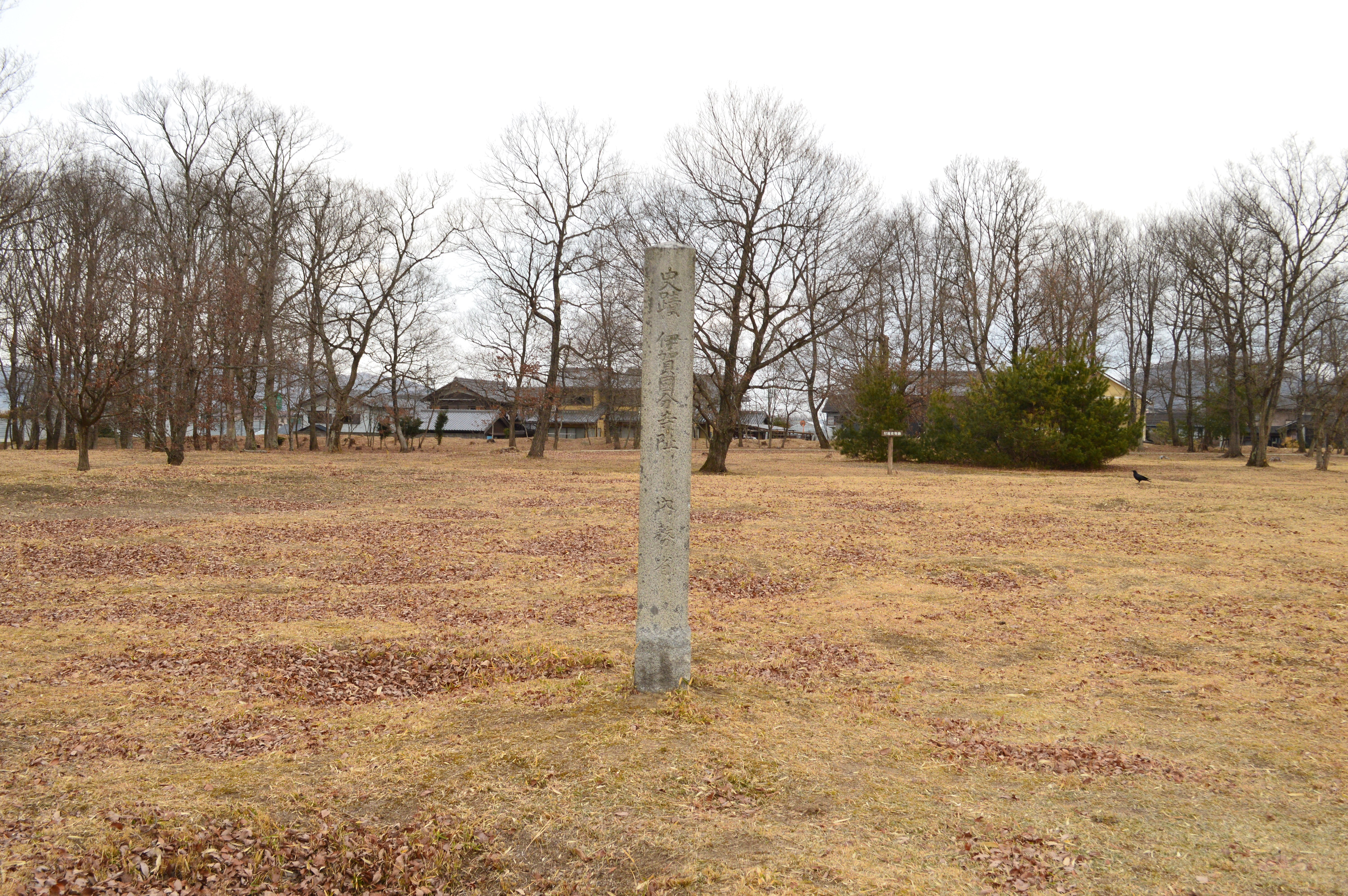 伊賀国分寺跡 石碑